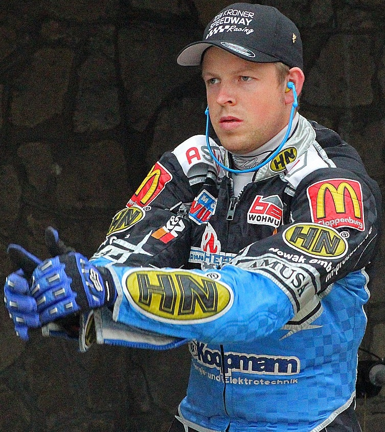 Tobias Kroner (fot.Mateusz Biskup)